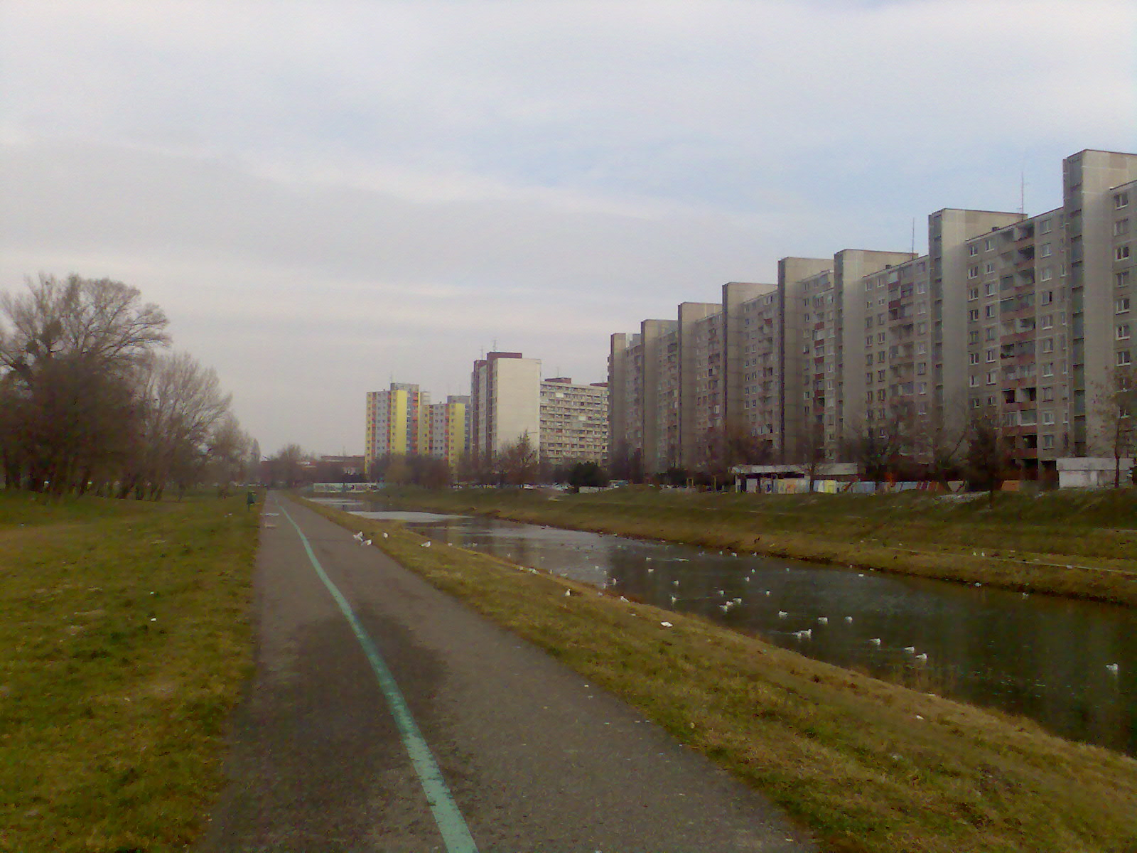 Petrzalka buildings and streets